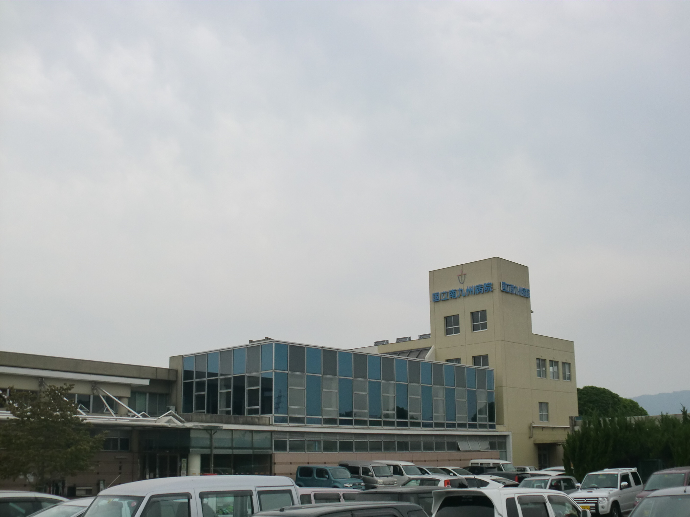 姶良市にある国立病院機構南九州病院